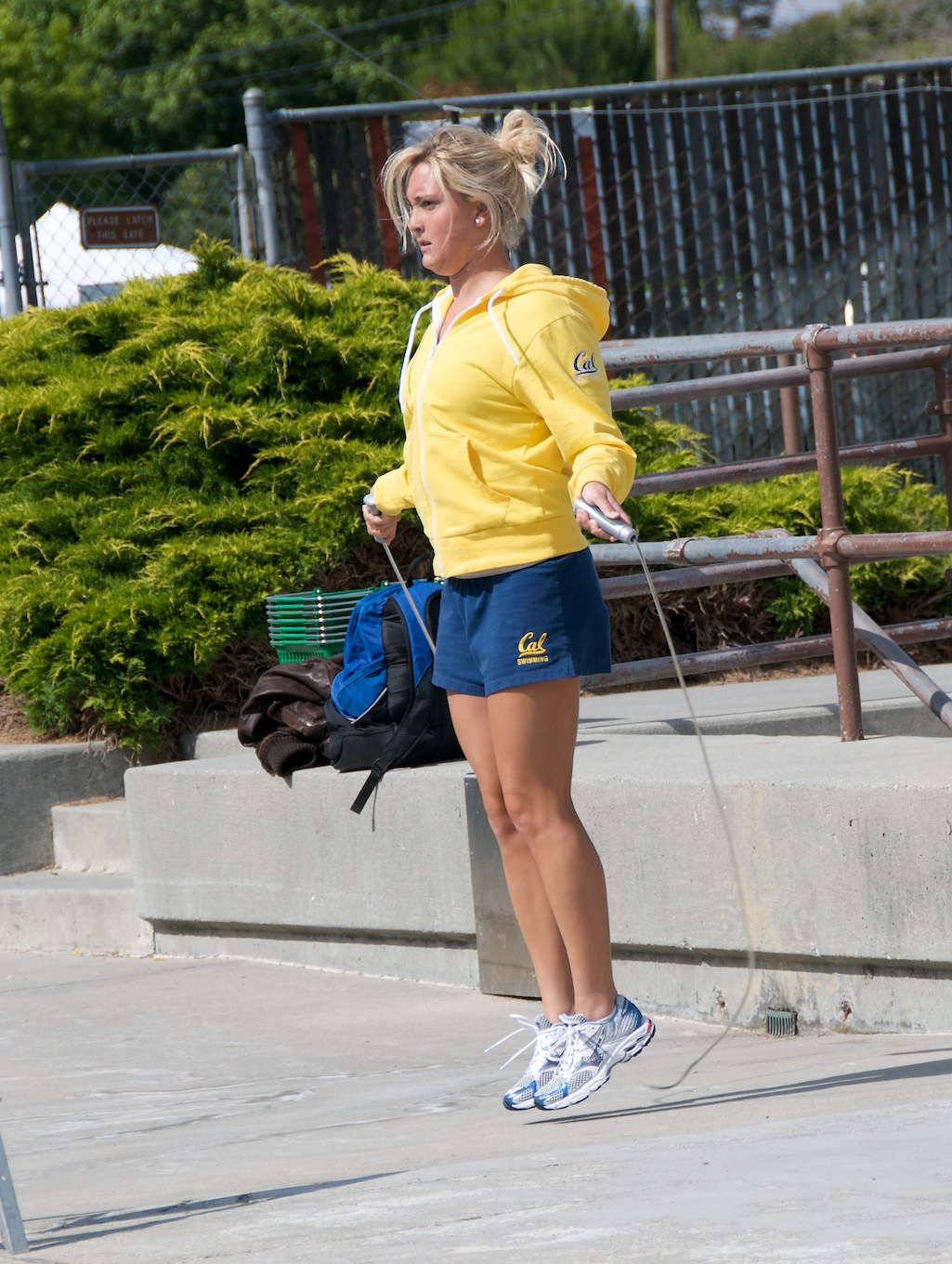 Jump rope